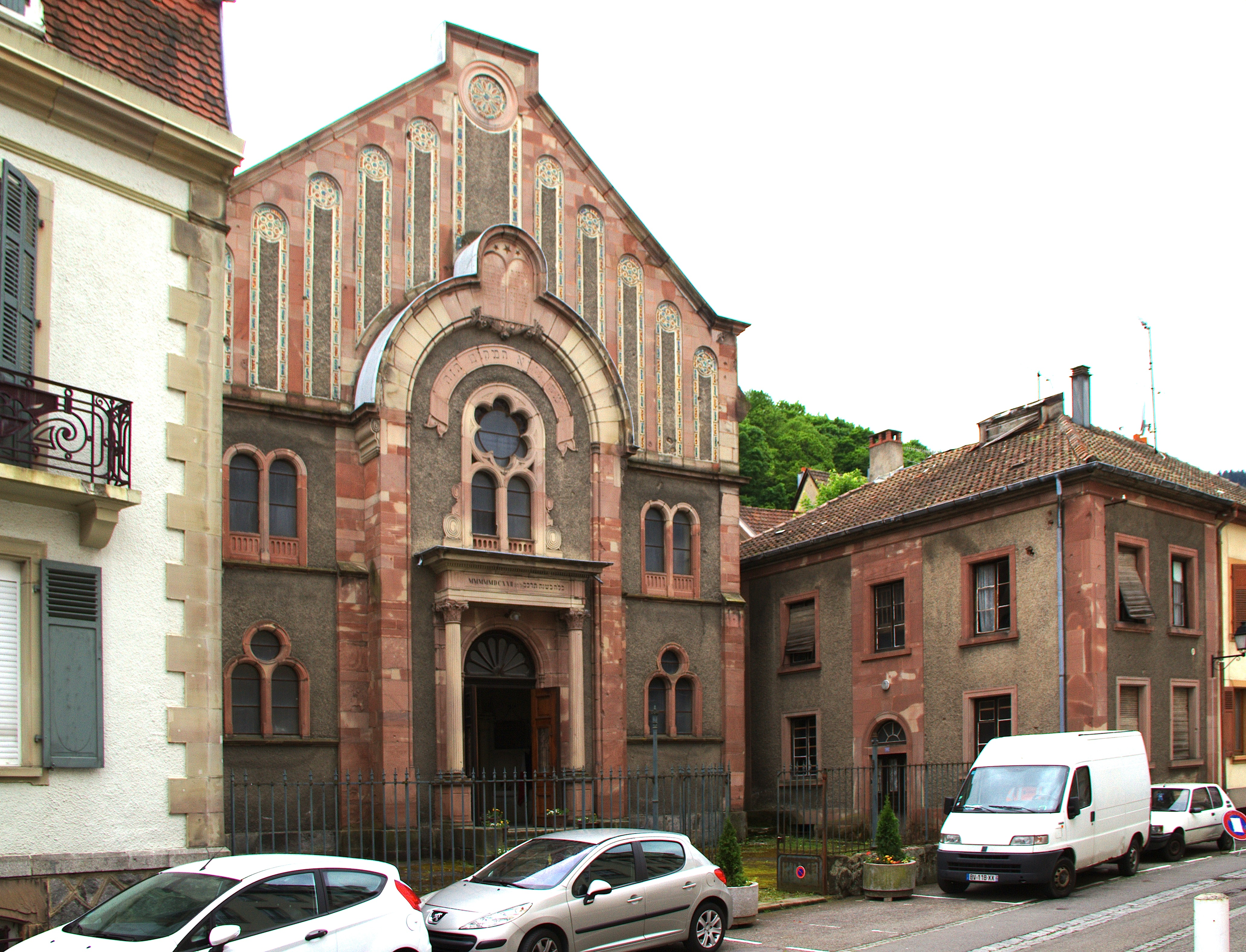 Thann (Haut-Rhin) la synagogue